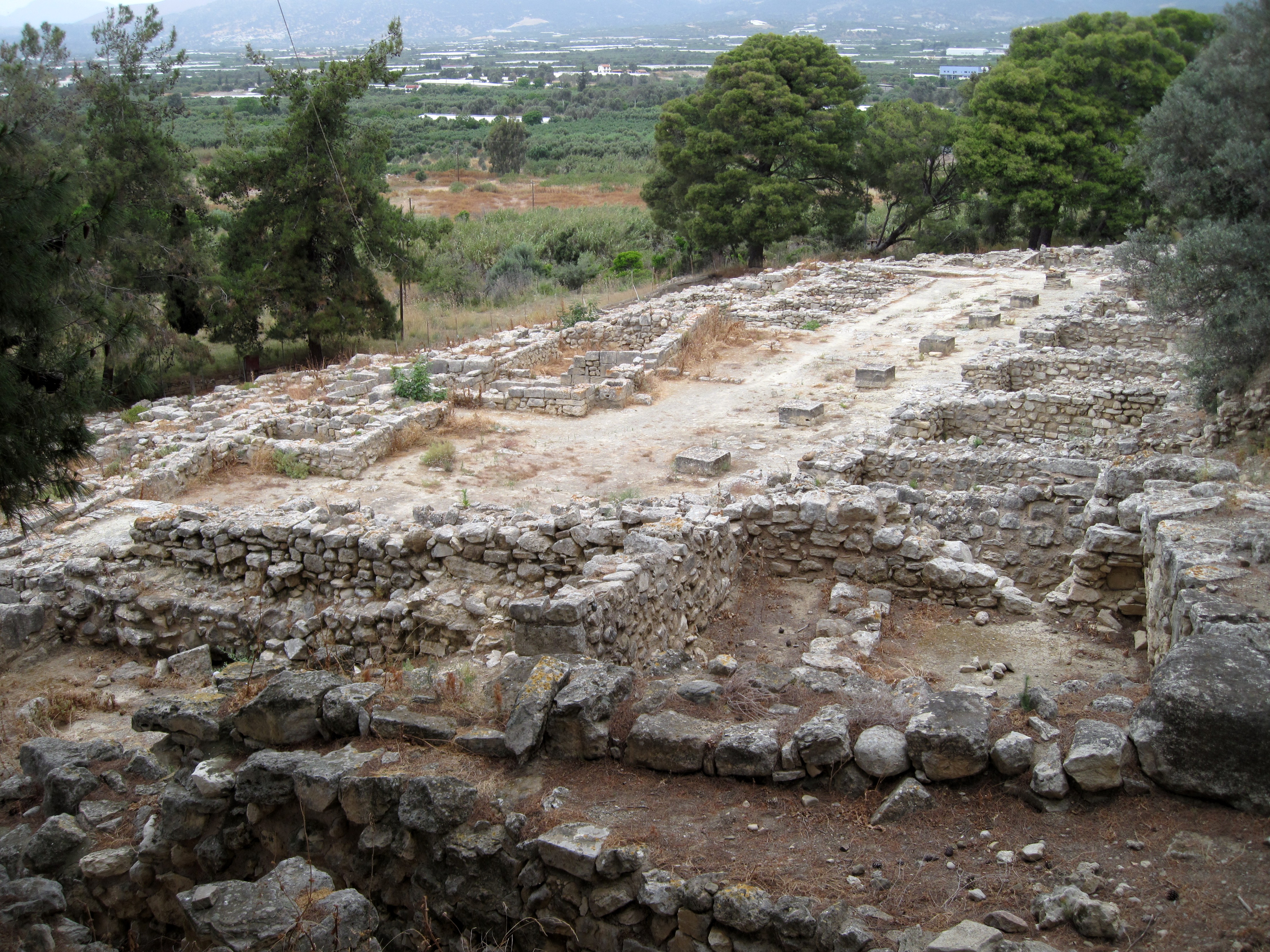 Ausgrabungsstätte von Agia Triada in der Gemeinde Festos, Regionalbezirk Iraklio, Kreta, Griechenland